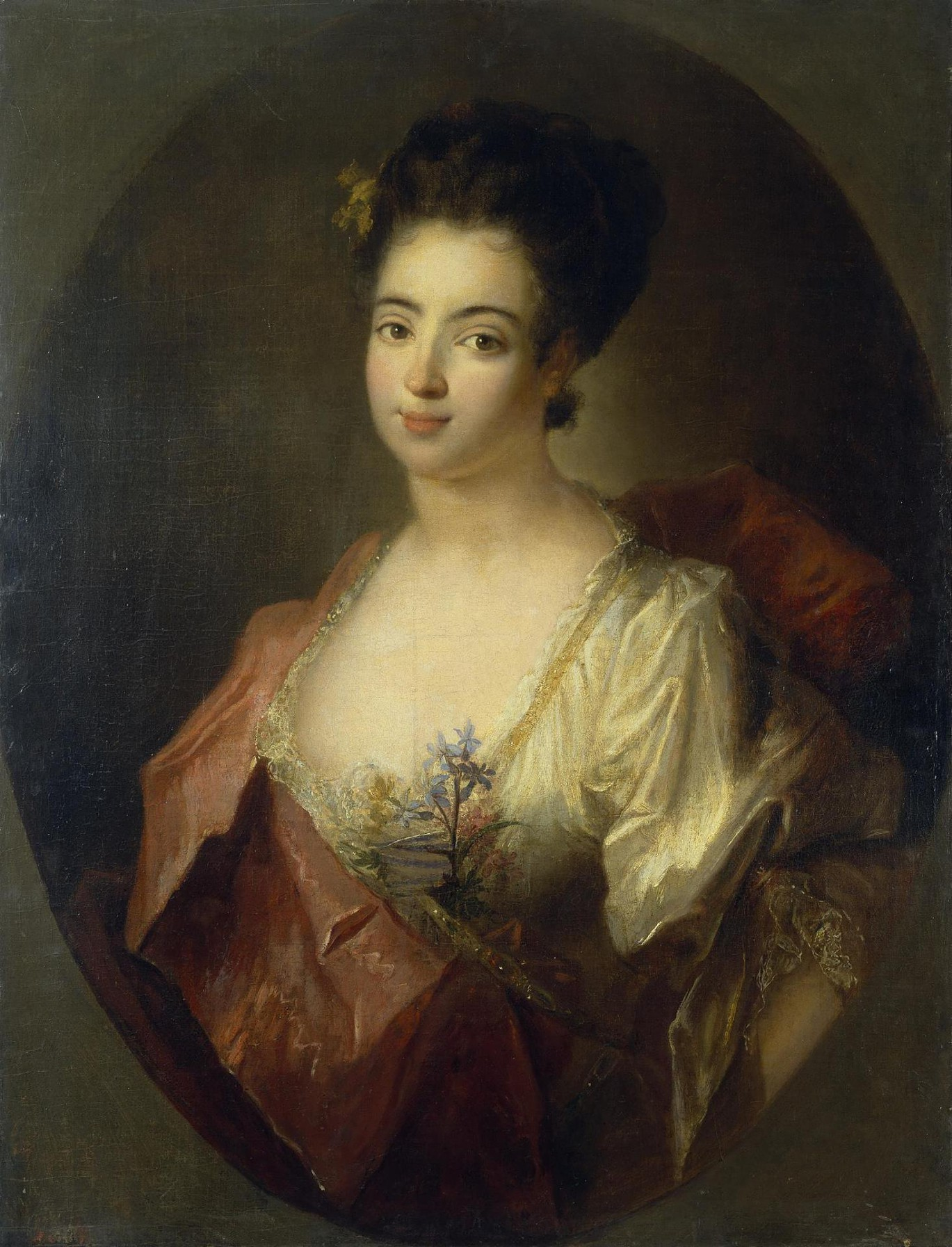 Татьяна Борисовна Куракина (1696—1757), двоюродная сестра царевича Алексея; дочь князя Б. И. Куракина и К. Ф. Лопухиной. Жена Михаила Михайловича Голицына.